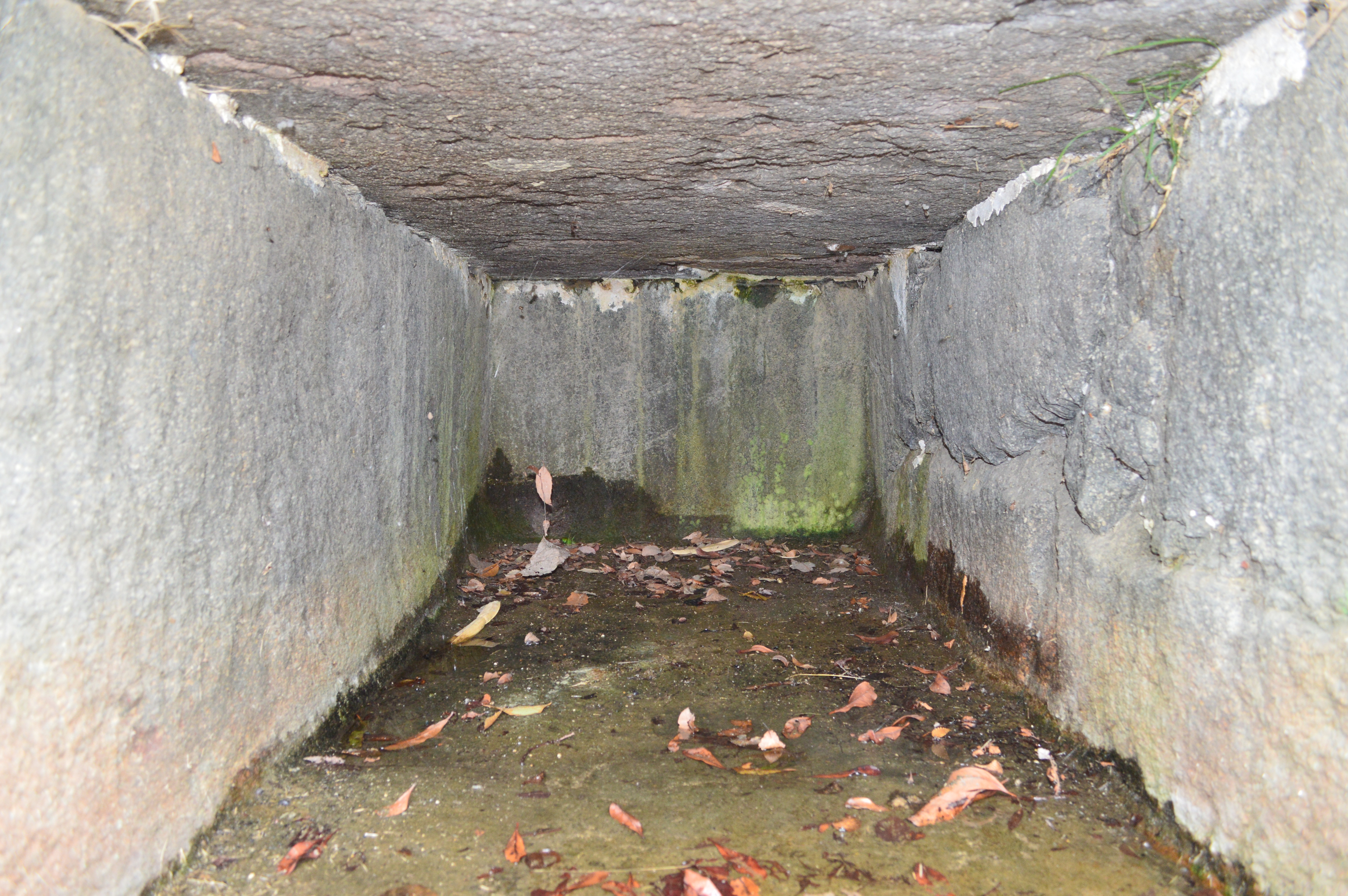 鉢伏山西峰古墳 石槨内部